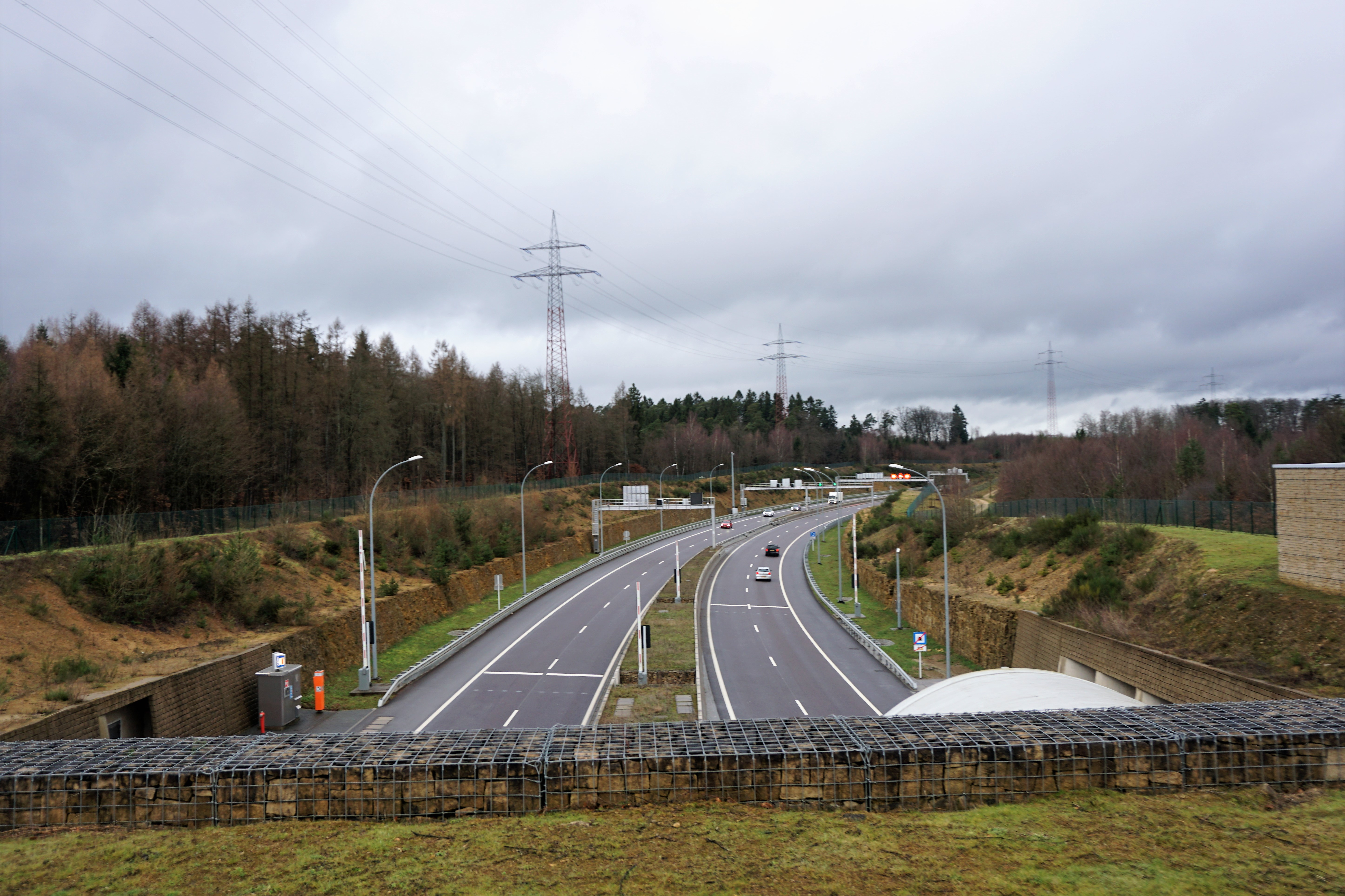 Sur l'autoroute A7, sortie nord du tunnel « Stafelter » au lieudit « Heeschdrëferbierg ». Vue en direction nord.